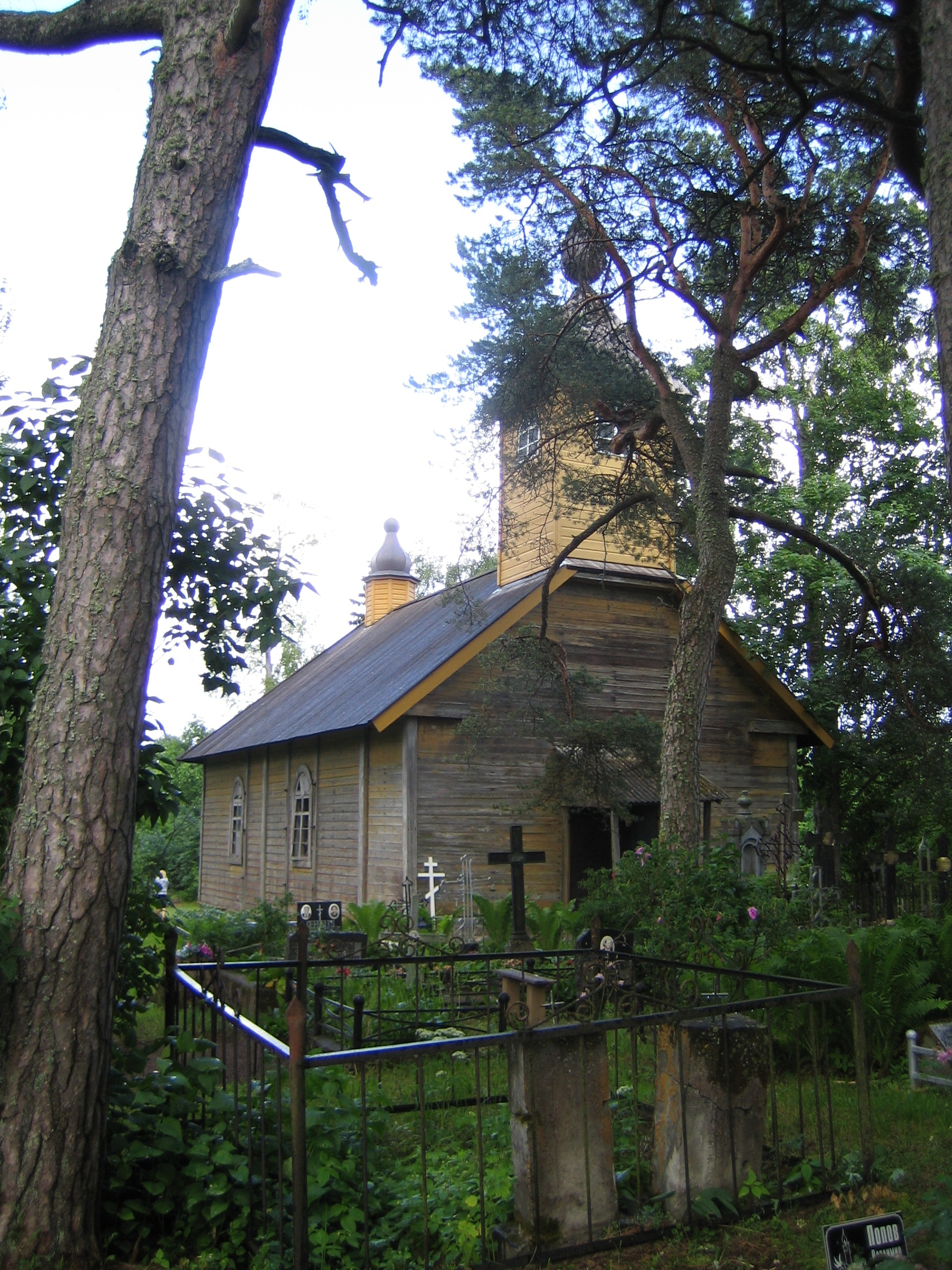 Lohusuu (Veneküla) kalmistu kabel